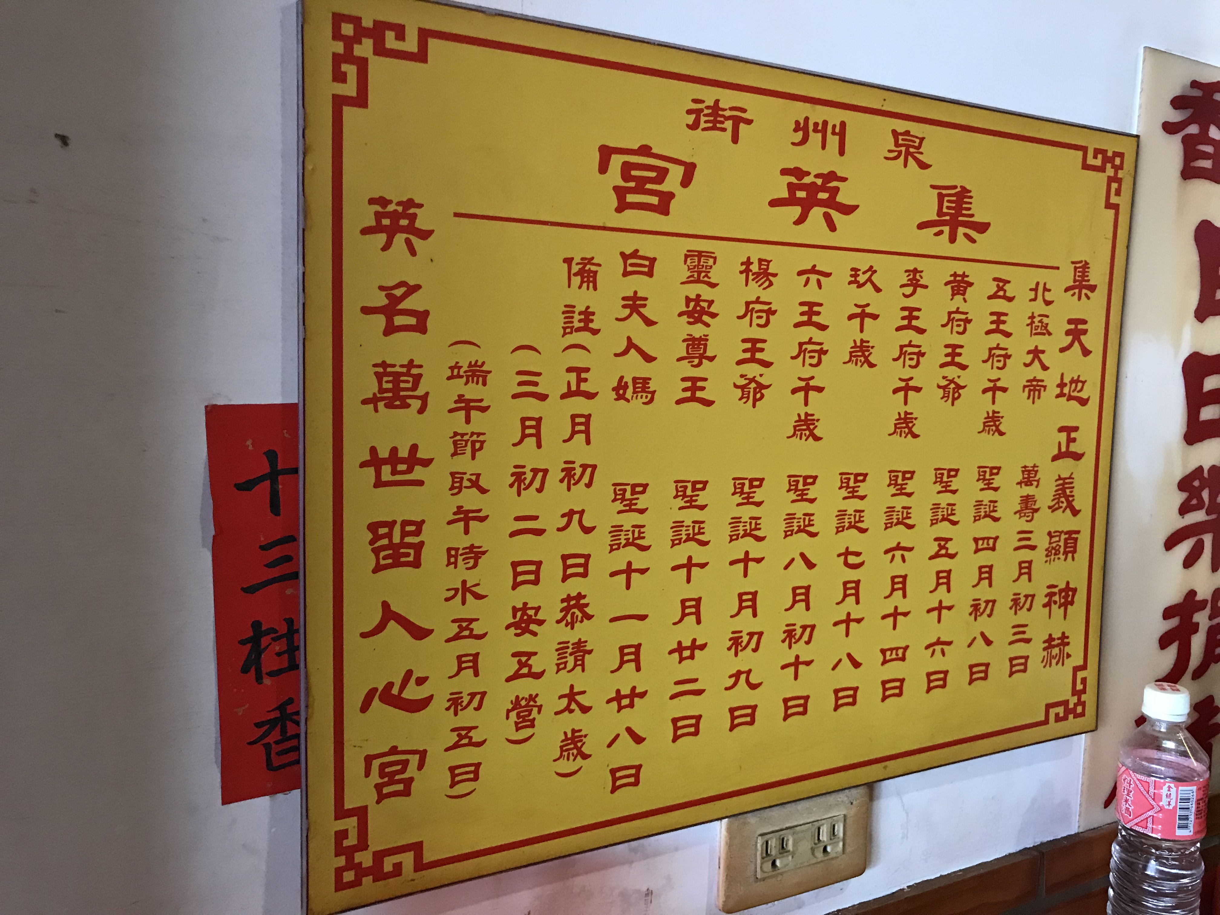 鹿港集英宮祀神表